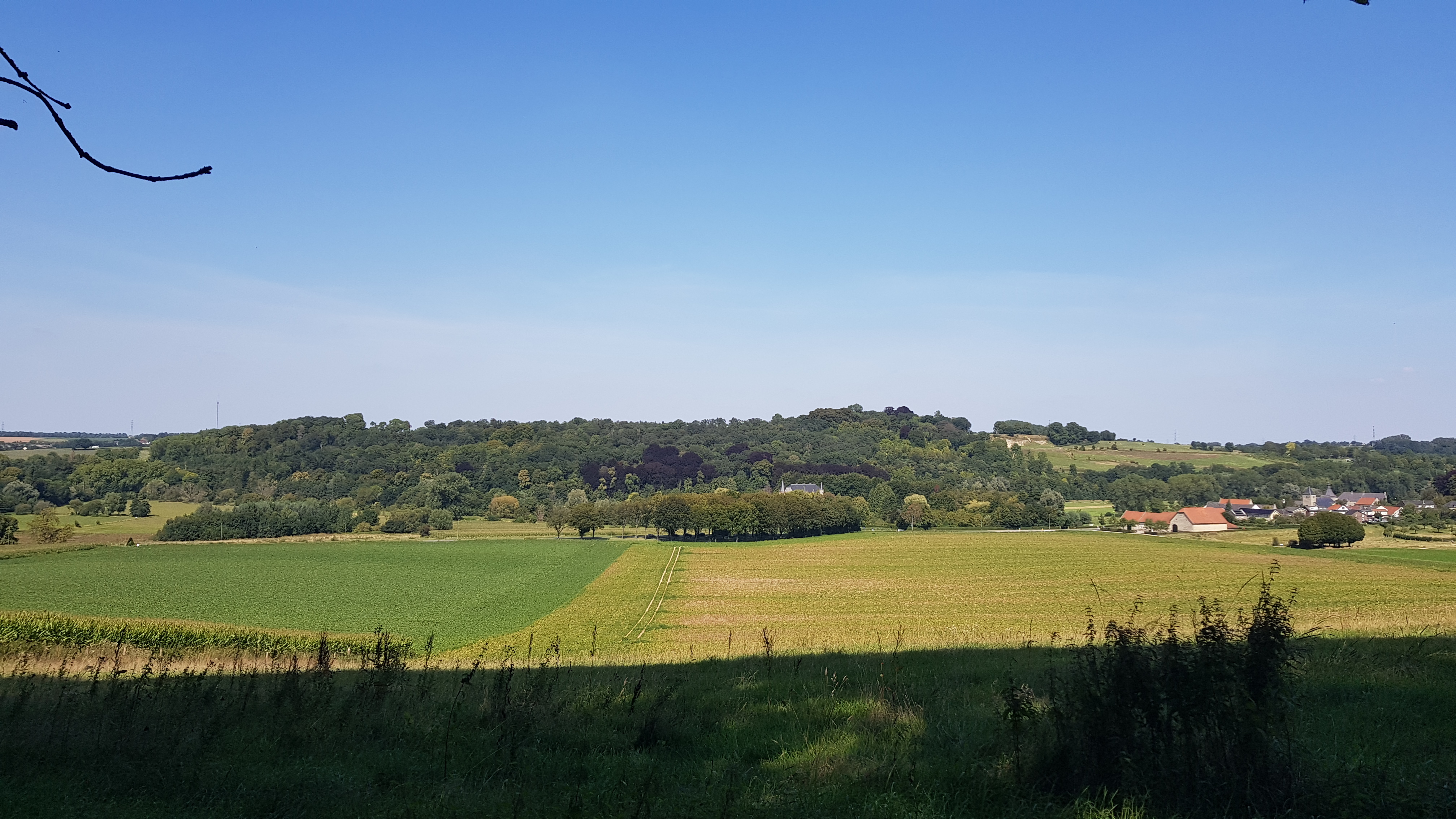 Schaelsberg, Oud-Valkenburg, Valkenburg aan de Geul, Nederland